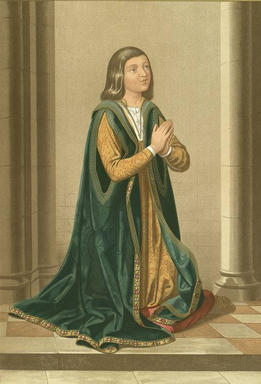 El príncipe don Juan de Aragón, hijo de los Reyes Católicos.